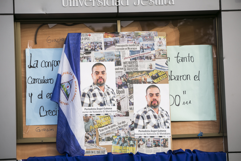 Homenaje a Ángel Gahona